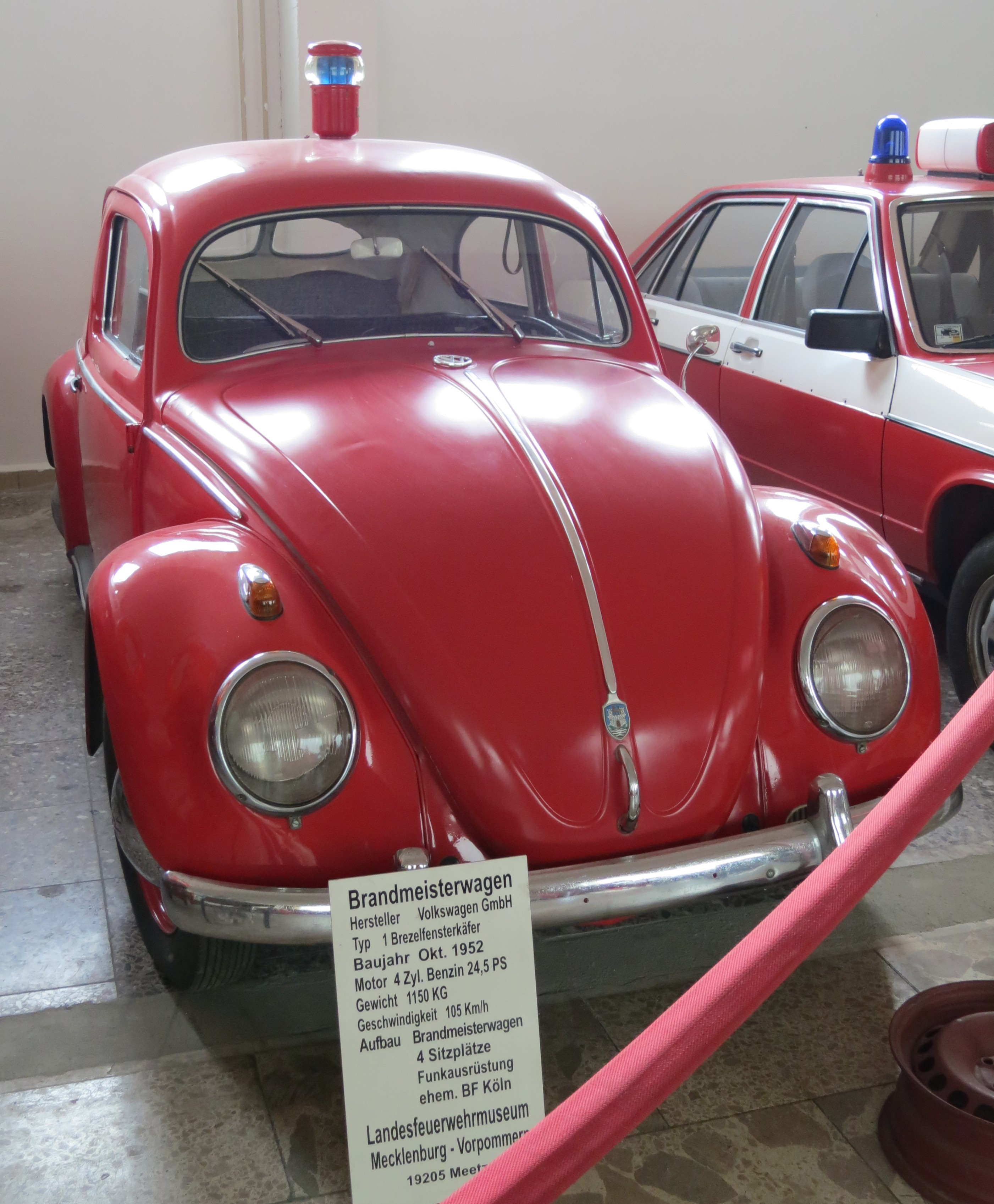 Internationales Feuerwehrmuseum Schwerin